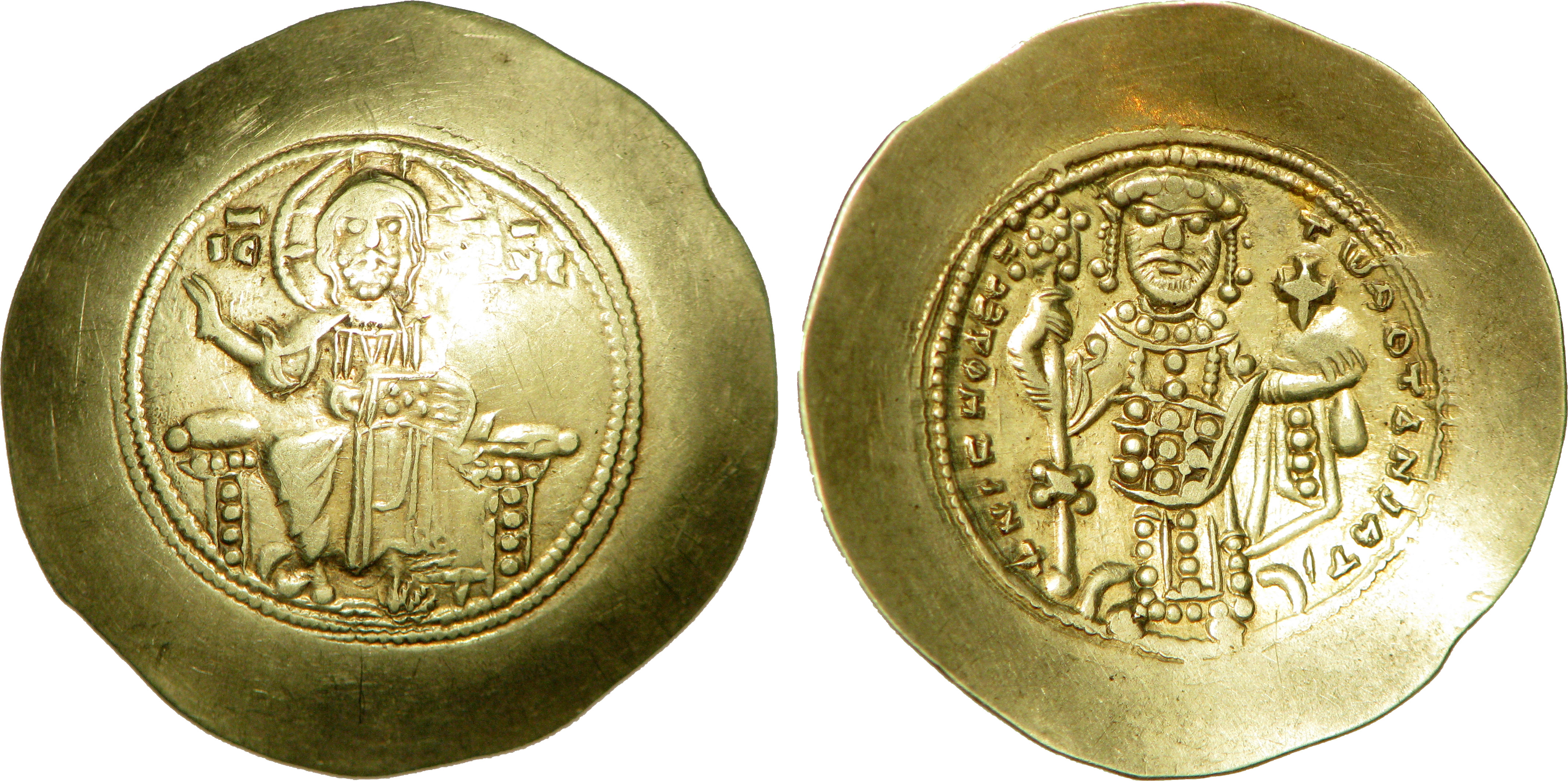 Nom de l'atelier : Constantinople Métal : électrum Diamètre : 29,5mm Axe des coins : 6h. Poids : 4,30g. Titulature avers : IC - XC. Description avers : Le Christ Antiphonetes assis de face, vêtu du pallium et du colobium, bénissant de la main droite et tenant les Évangiles de la gauche ; double grènetis. Traduction avers : (Jésus-Christ). Description revers : Nicéphore III couronné debout de face sur une base, vêtu du loros, tenant un labarum croiseté de la main droite et un globe crucigère de la main gauche ; double grènetis. Légende revers : + NIKHF DES - Tw ROTANIATI. Traduction revers : (Nicéphore despote Botoniates).